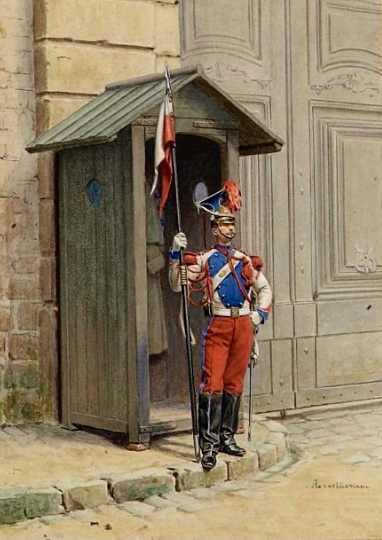 Lancier de la Garde impériale en sentinelle. Aquarelle et gouache, 36 x 26 cm.